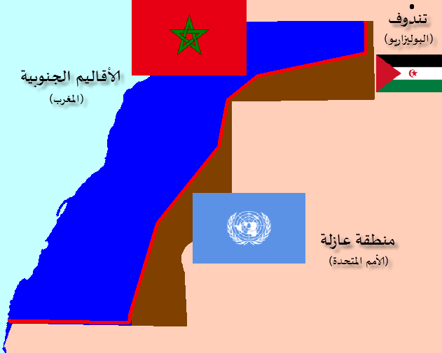 خريطة الصحراء الغربية: (الأقاليم الجنوبية، المغرب) - (المنطقة العازلة، الأمم المتحدة) - (تندوف، مخيمات الجمهورية العربية الصحراوية الديمقراطية)